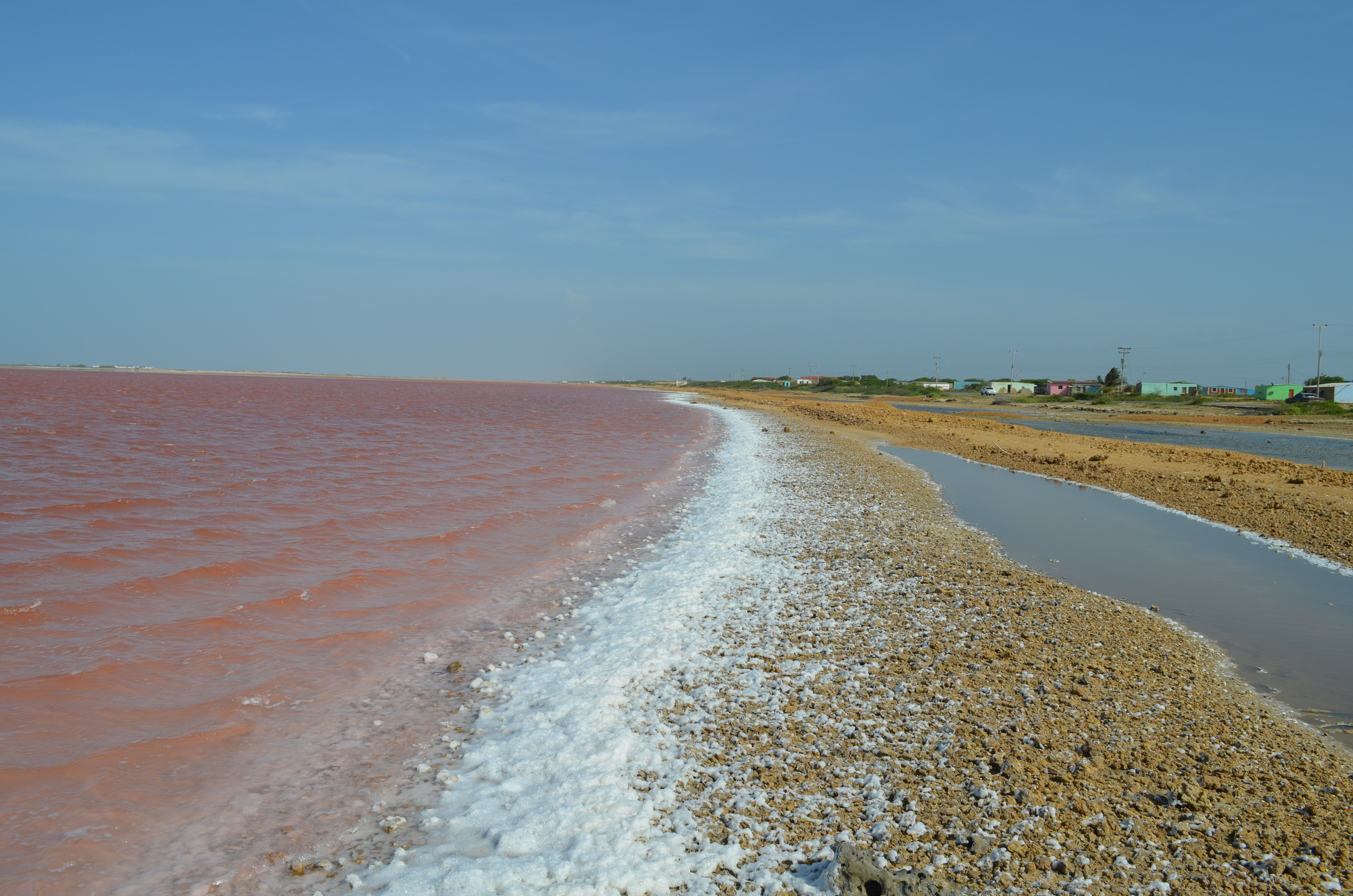 Falcon, Falcón, Venezuela